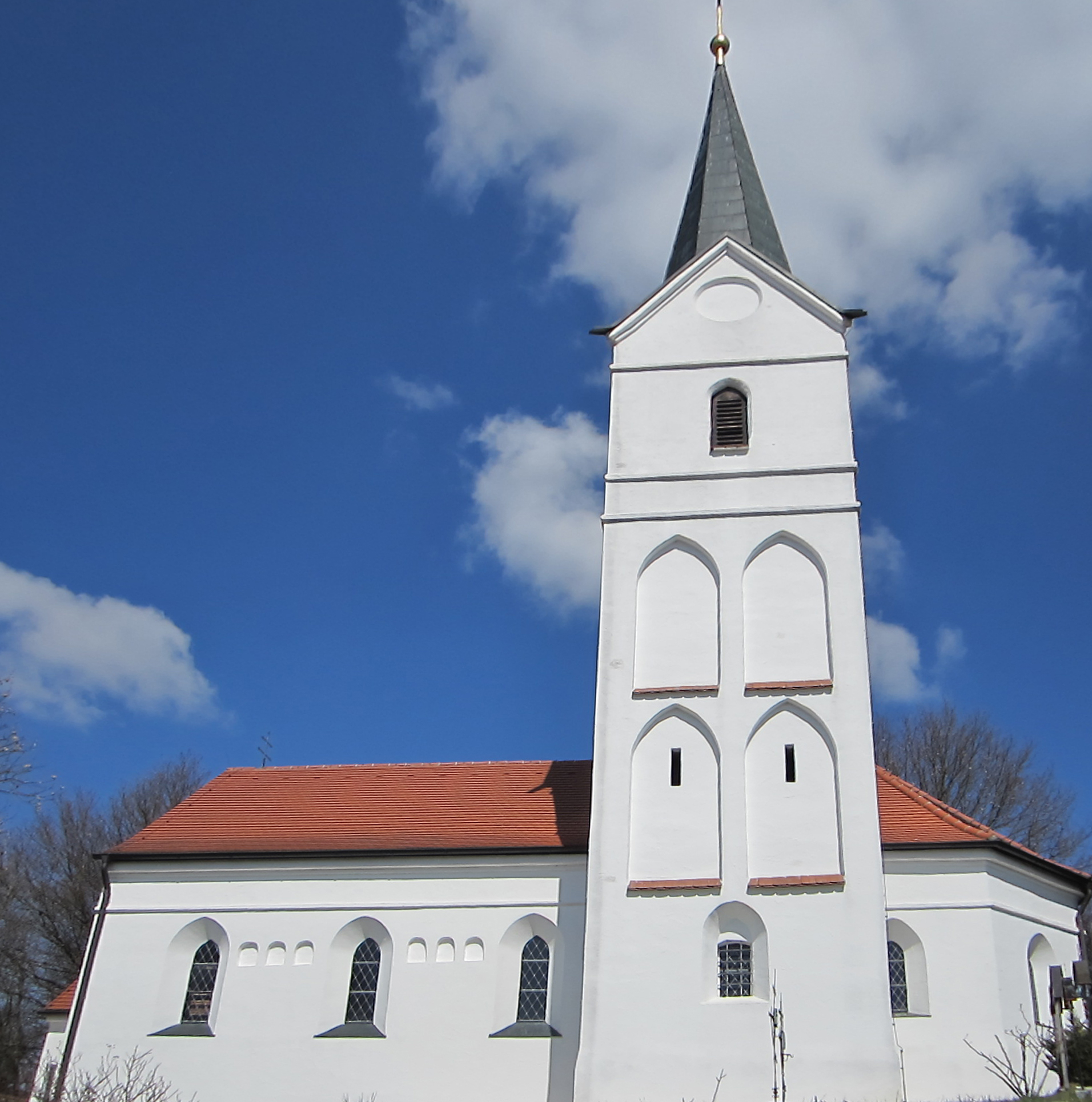 Foto der Kirche St. Paul in Bruckberg.